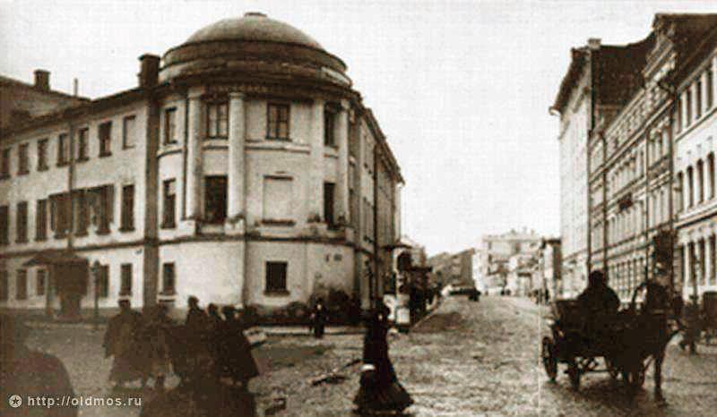 5-я мужская классическая гимназия на углу Поварской и Большой Молчановки в Москве